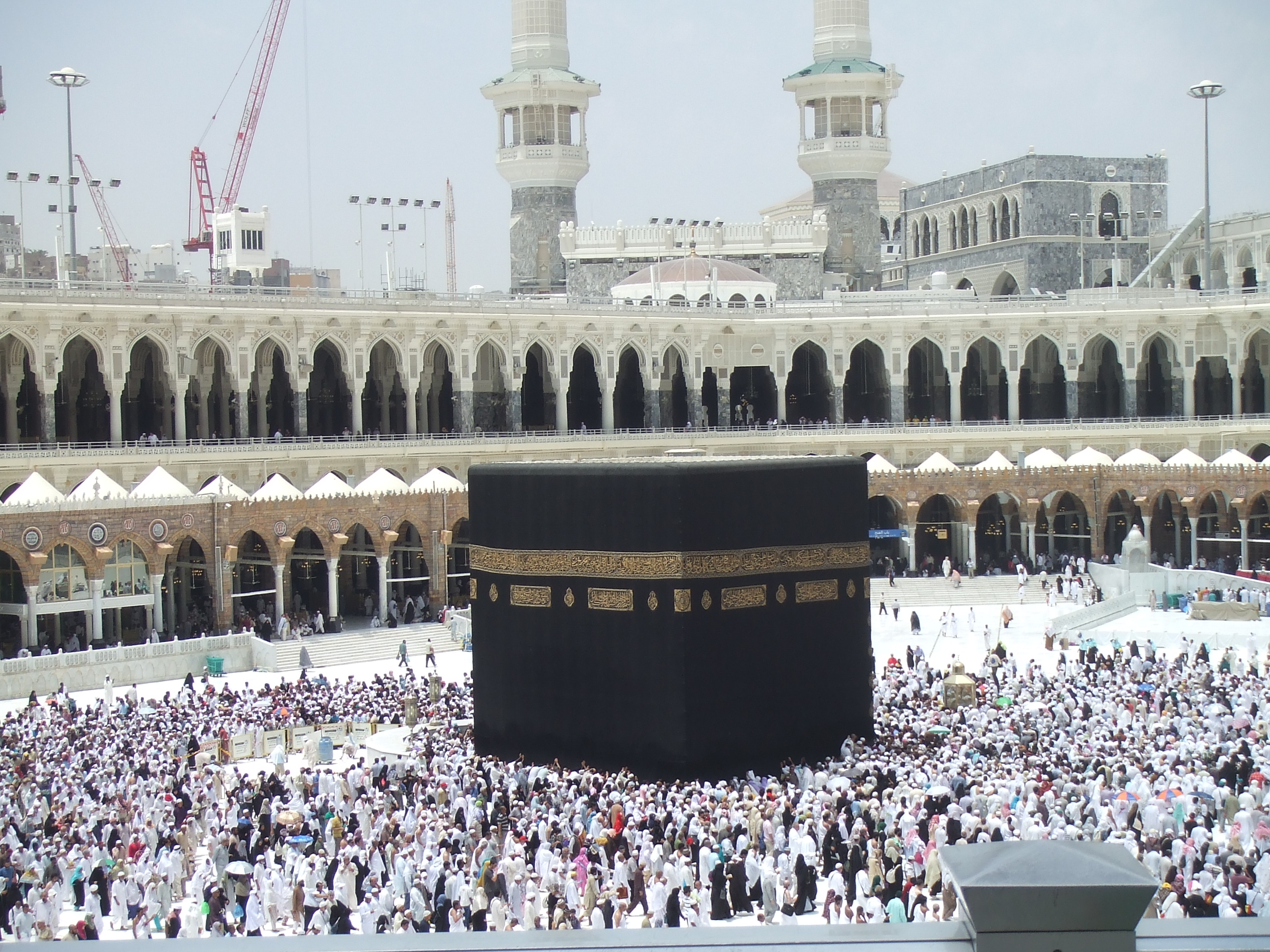 Al Haram, Mecca 24231, Saudi Arabia